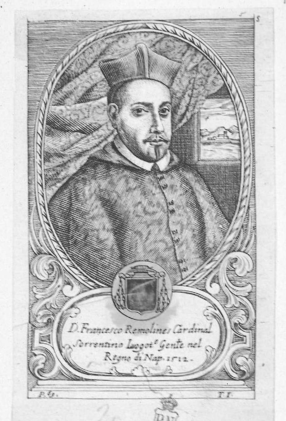 Francisco Remolines. Grabado calcográfico anónimo recogido en Teatro eroico, e politico de'governi de'Vicere del Regno de Napoli, de Domenico Antonio Parrino, Nápoles, 1692-1695. Biblioteca Nacional de España.